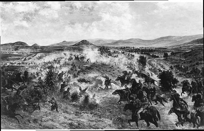 La Batalla de Miahuatlán tuvo lugar el 3 de octubre de 1866 en las inmediaciones de la población del actual municipio de Miahuatlán de Porfirio Díaz en el estado de Oaxaca, México, entre elementos del ejército mexicano de la república, al mando del general Porfirio Díaz y tropas francesas al servicio del Segundo Imperio Mexicano.